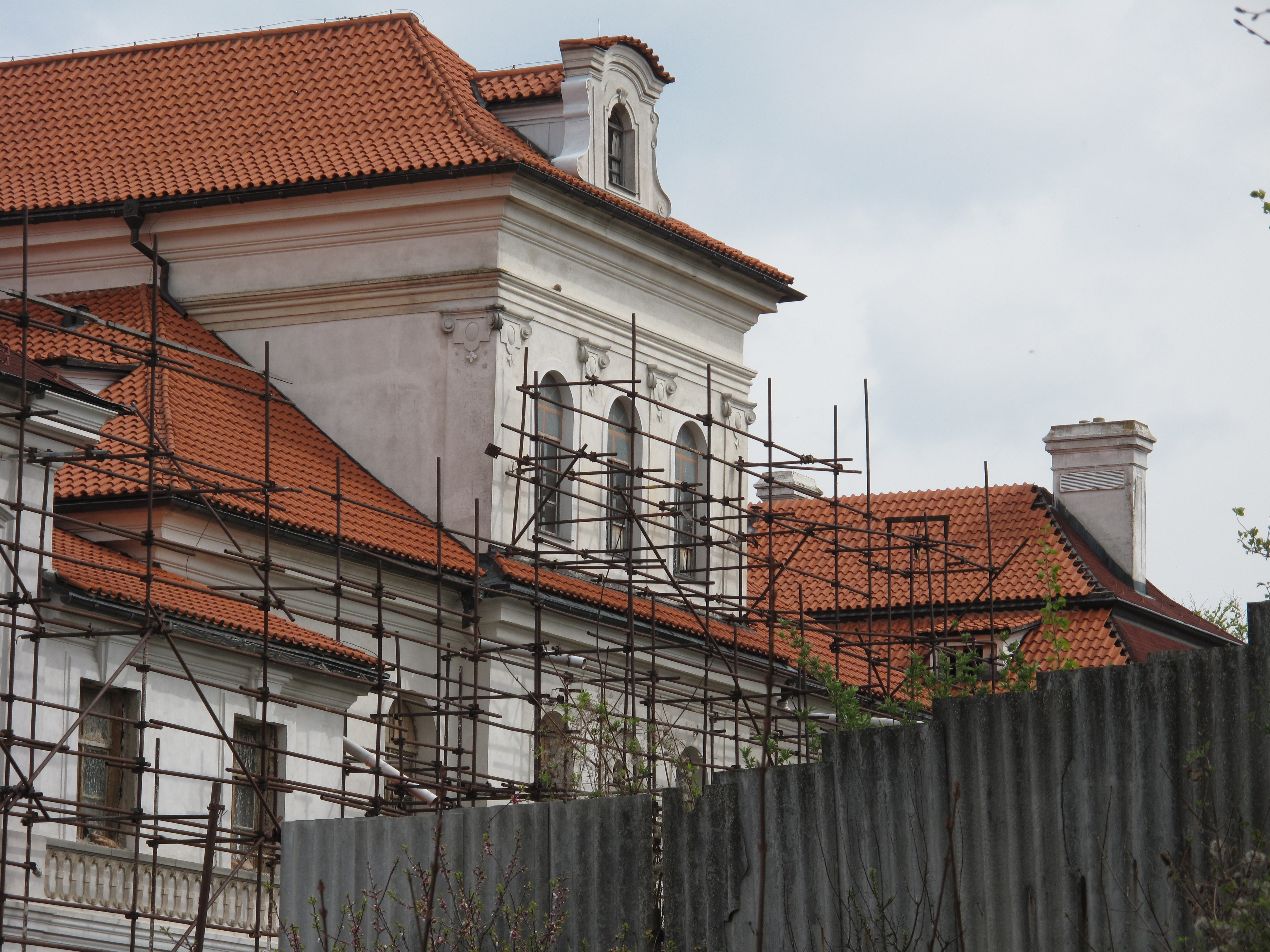 Týnec (okres Klatovy). Okres Klatovy, Česká republika.